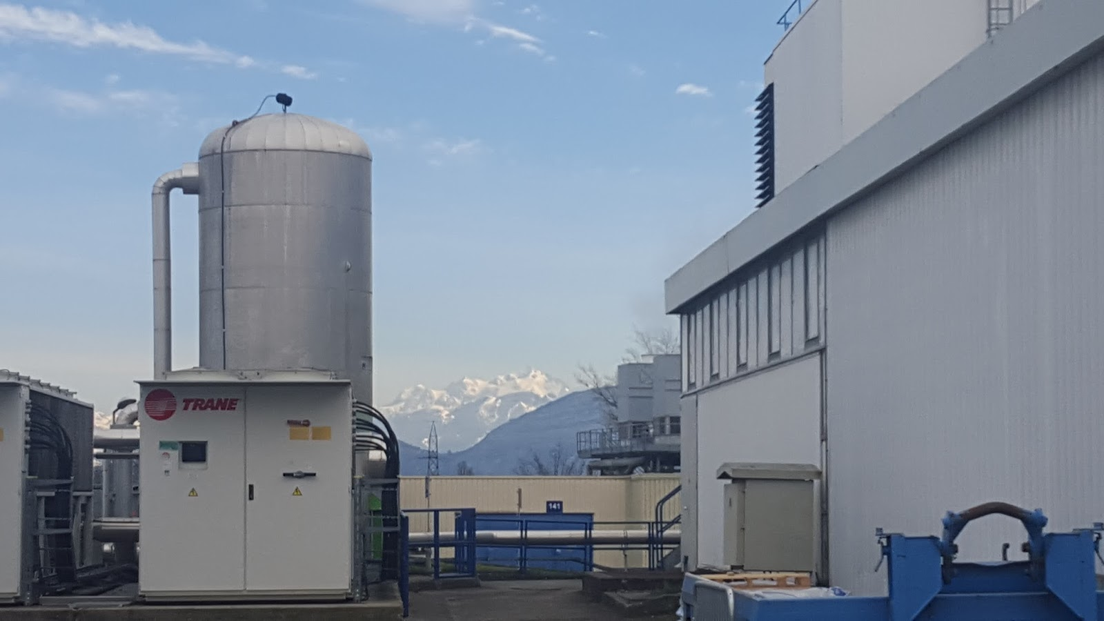 מיכל ההליום באתר הCMS